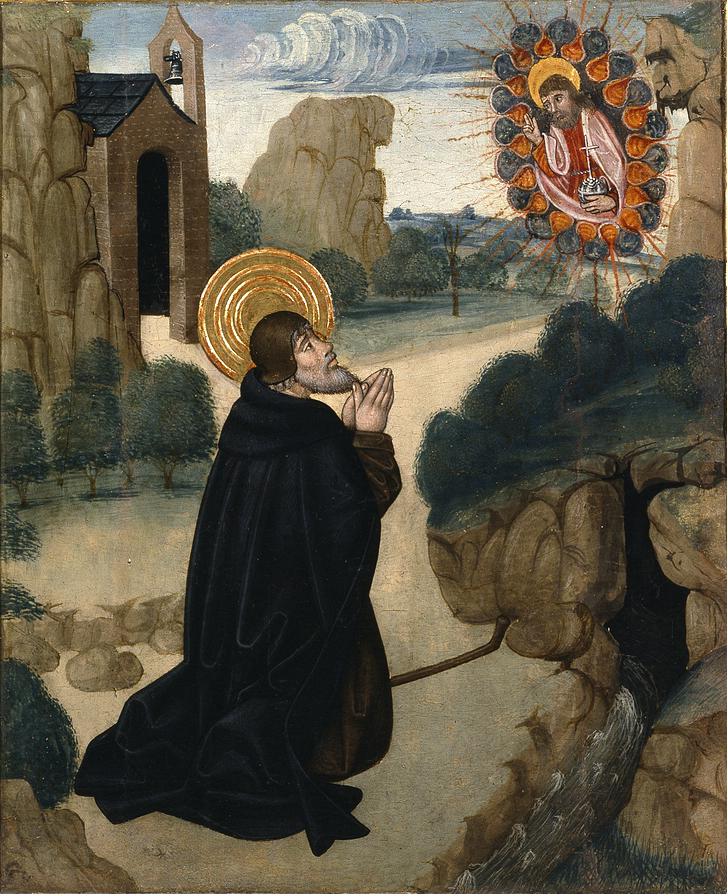 Juan de la Abadía el Viejo, Escenas de la vida de San Antonio Abad, hacia 1490, óleo sobre tabla, 190 cm x 57 cm. Museo del Prado (Madrid, España), tabla inferior.